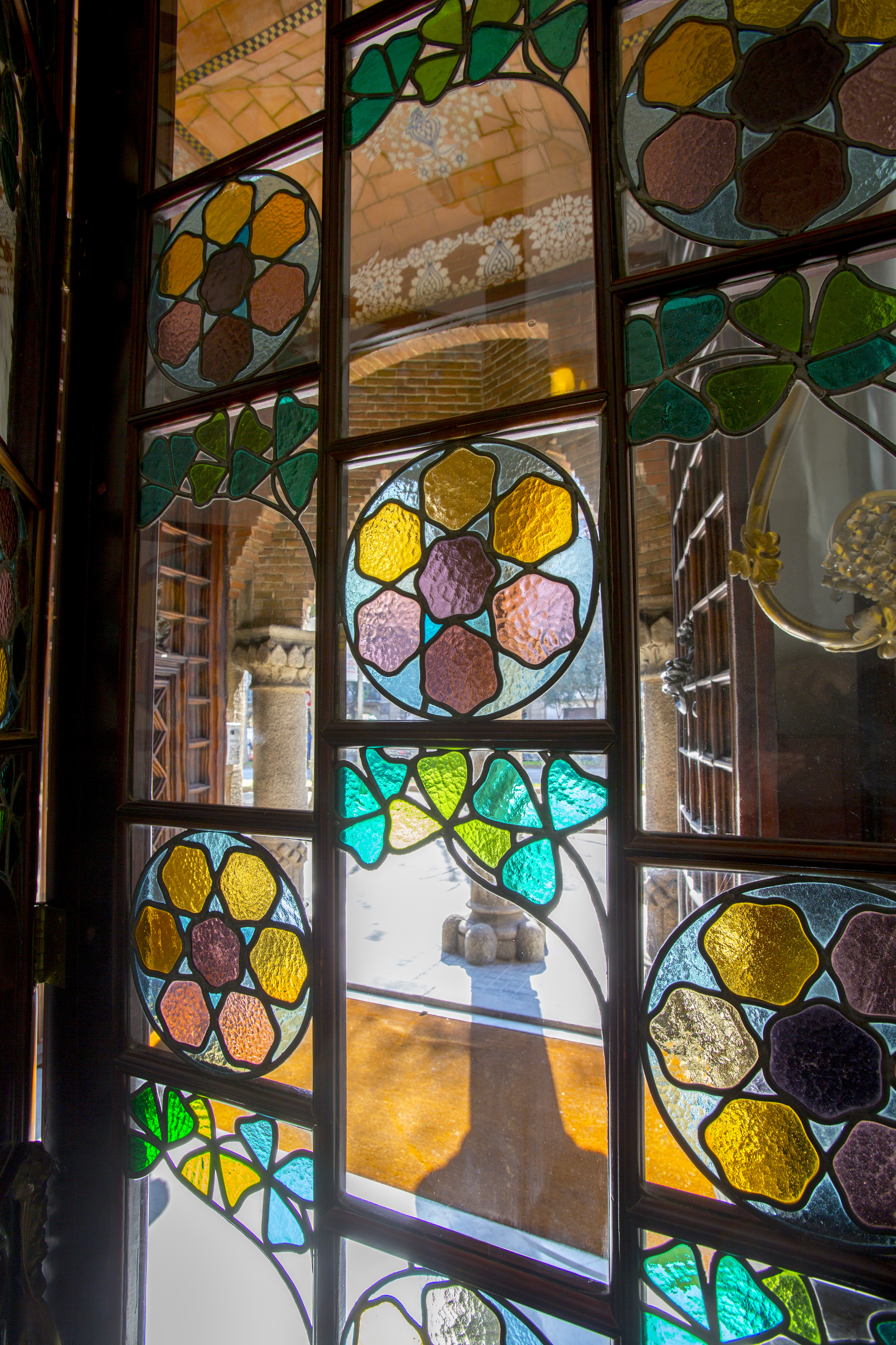 Vitralls de la Casa de les Punxes